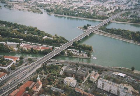 Bridge Árpád, Budapest, Hungary